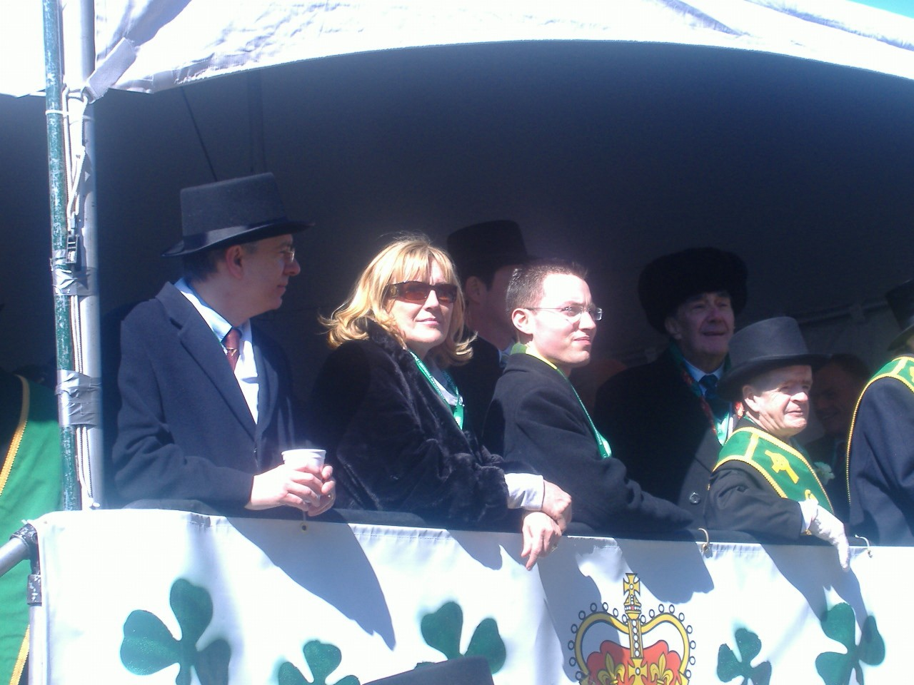 Estrade d'honneur lors du défilé de la Saint-Patrick de 2009 à Montréal. Louise O'Sullivan.